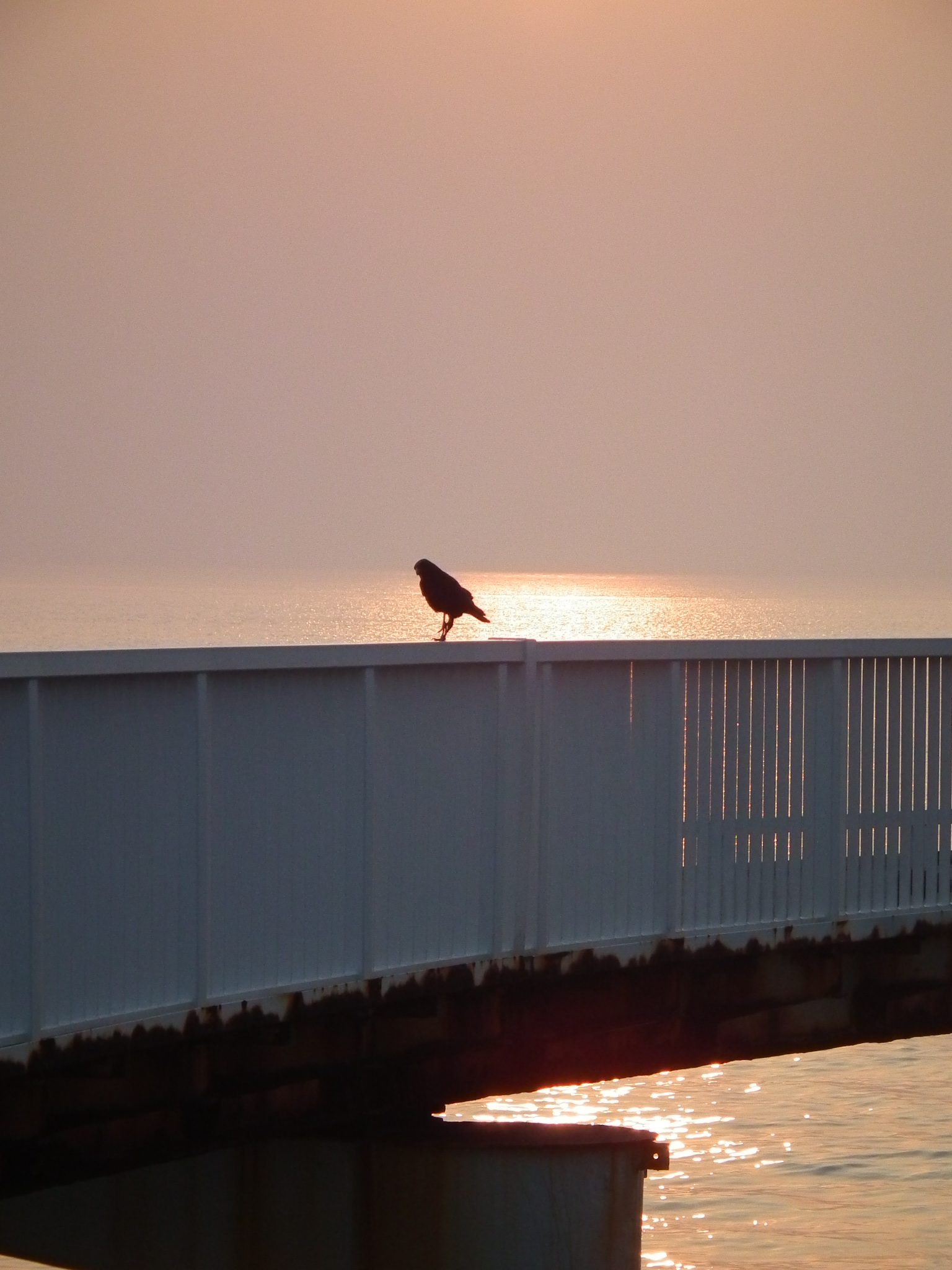 Benten-island MinamiAwaji-city 弁天島南あわじ市